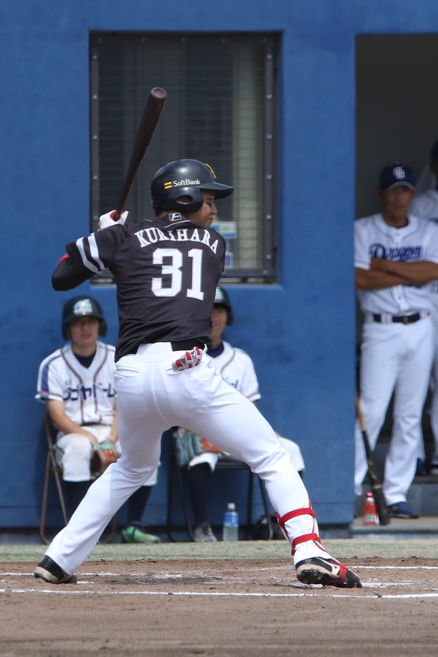 打席に立つ栗原